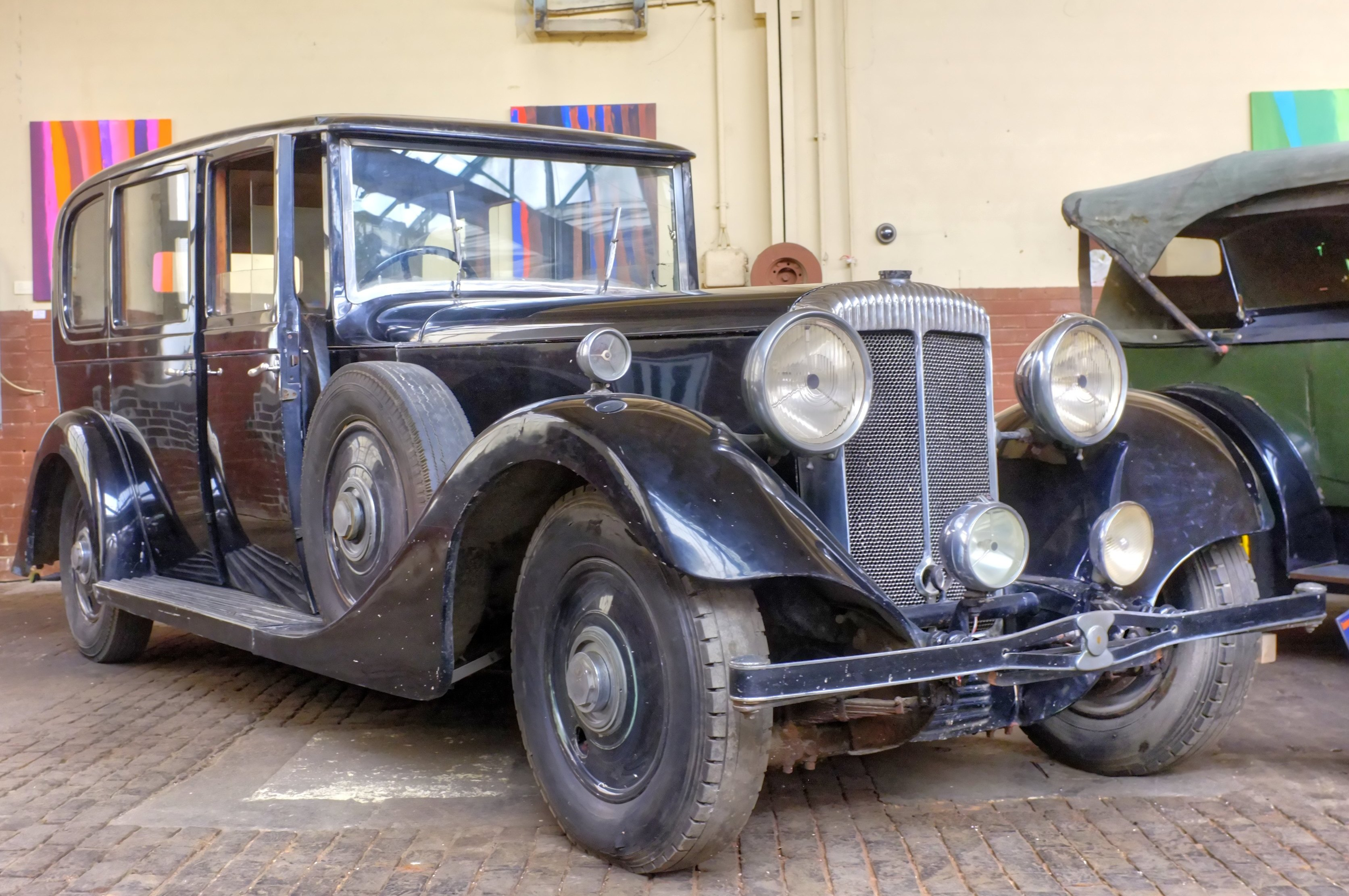 1934 Daimler Twenty-Five Straight-Eight V26 limousine by Hooper at Schlafende Schönheiten Kassel